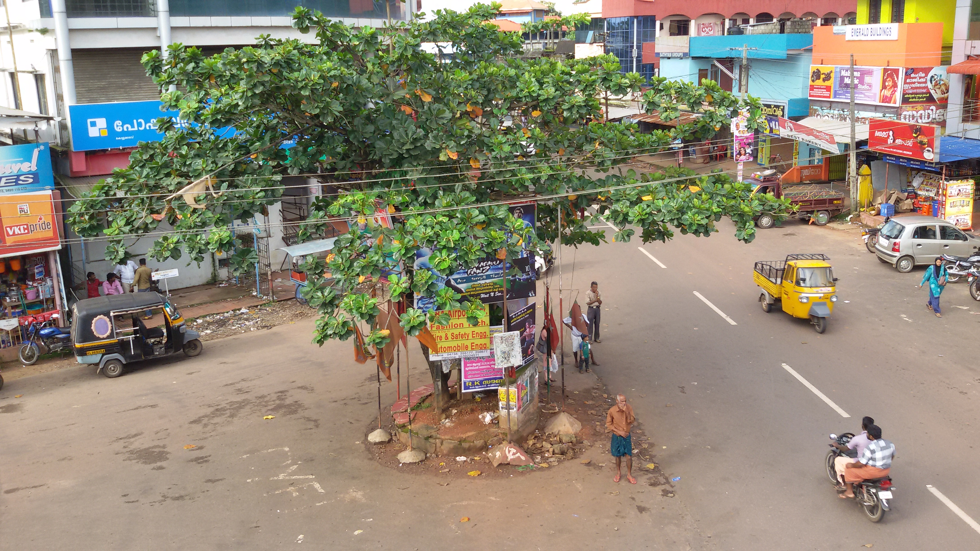 കൊല്ലകടവ് ജങ്ഷന്‍, ചെറിയനാട്